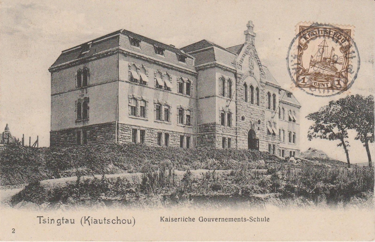 青岛督署学校新教学楼